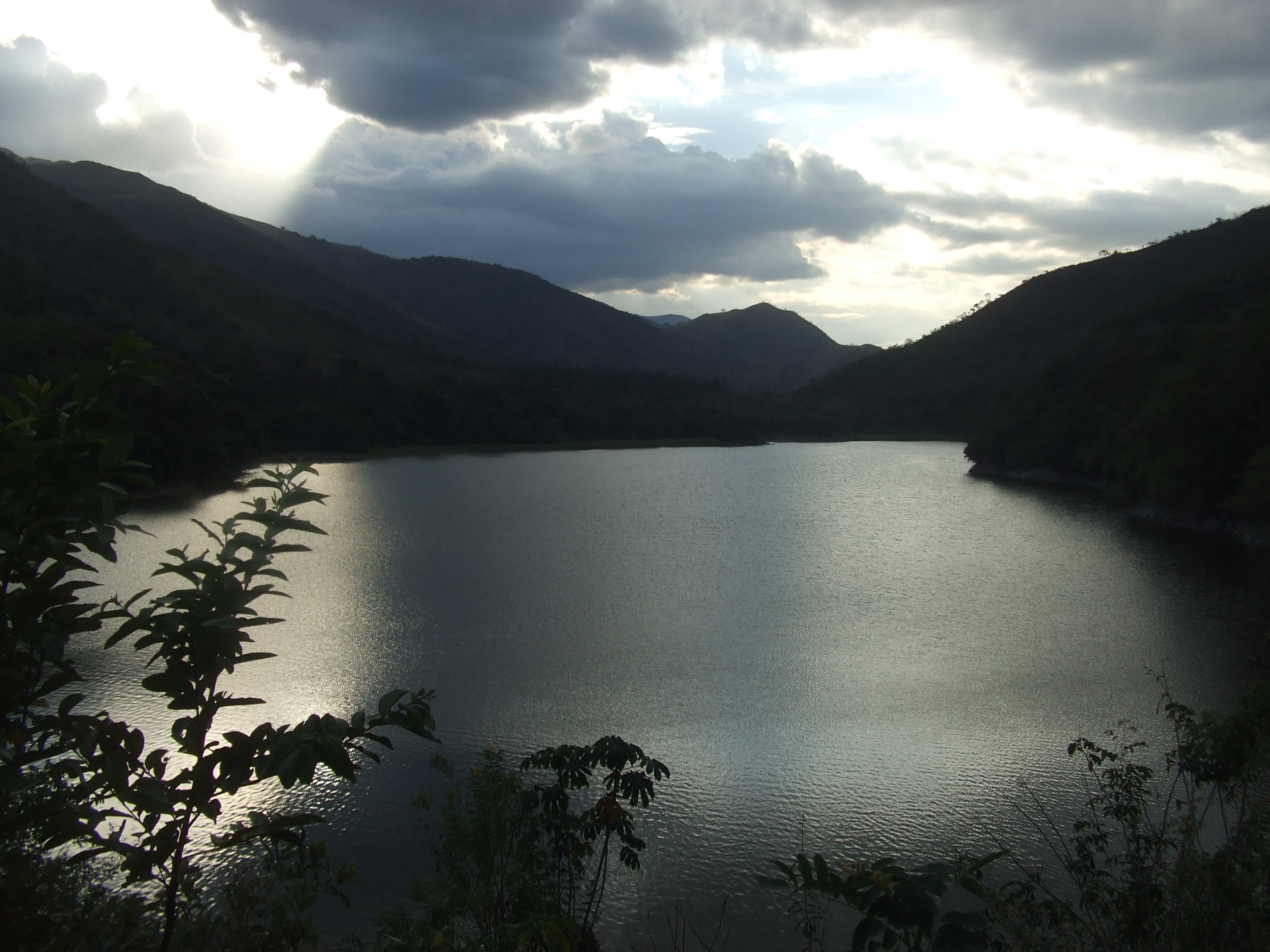 Tomada desde la parte alta de la vía hacia Caripe antes de llegar a la represa